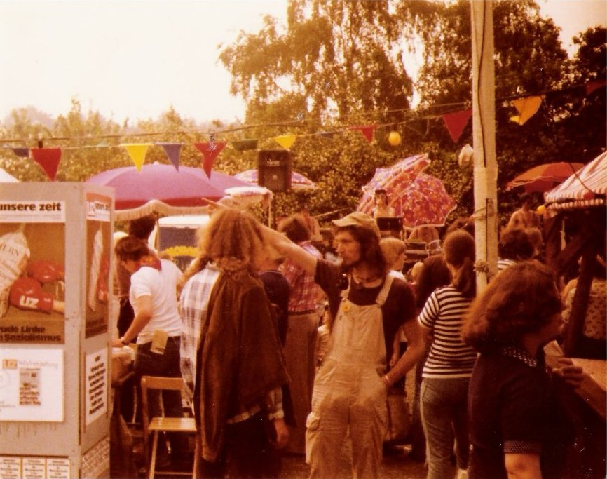 UZ Pressefest 1978